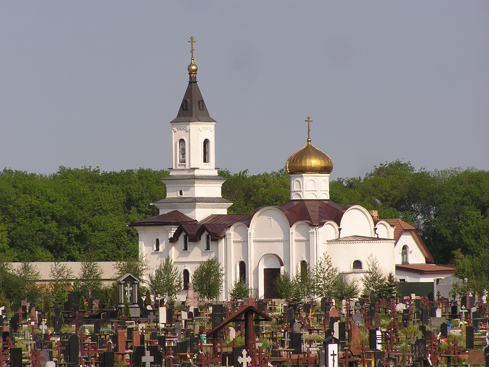 Киевский район Донецка.